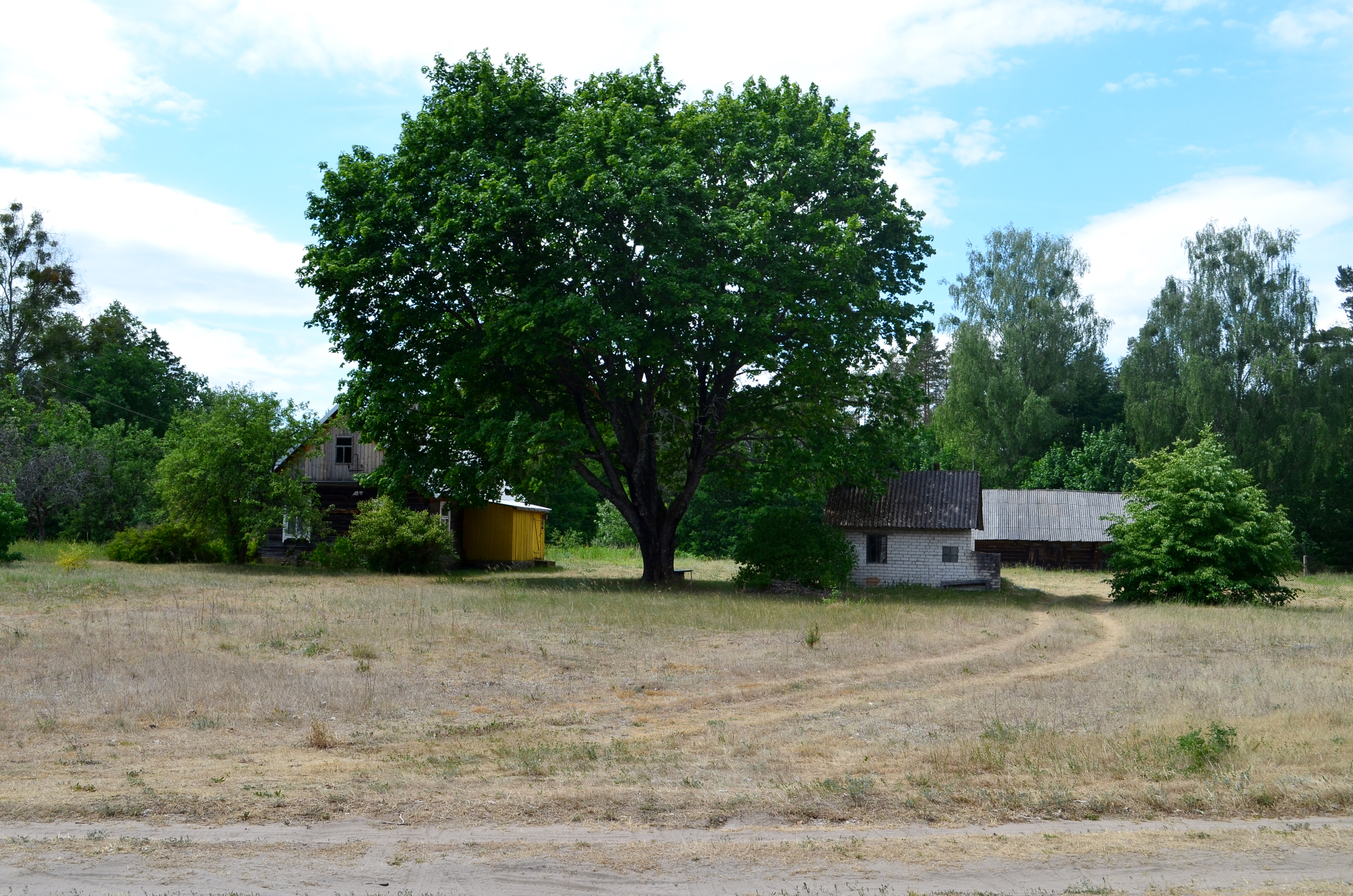 Ucieka, Varėnos raj.